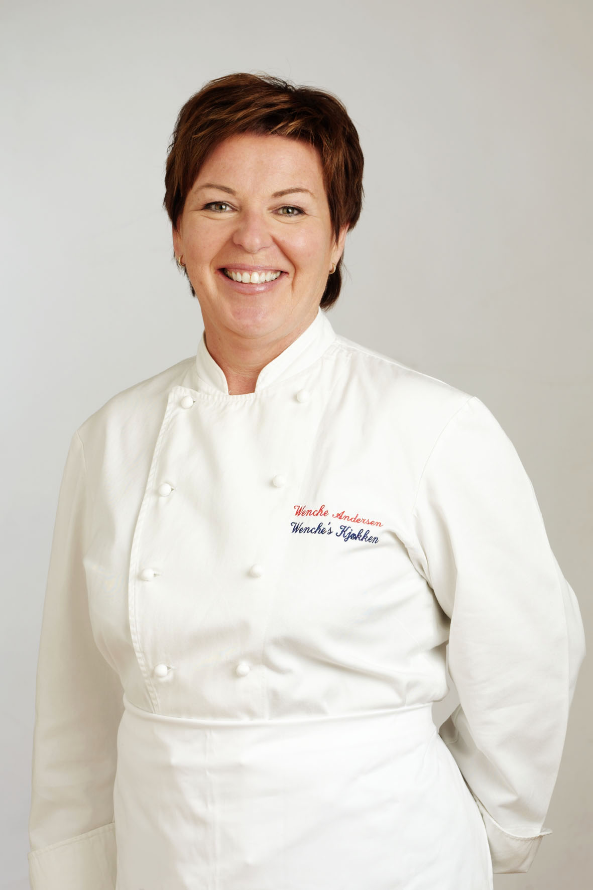 Ny Nordisk Mat-ambassadörern Wenche Andersen från Norge